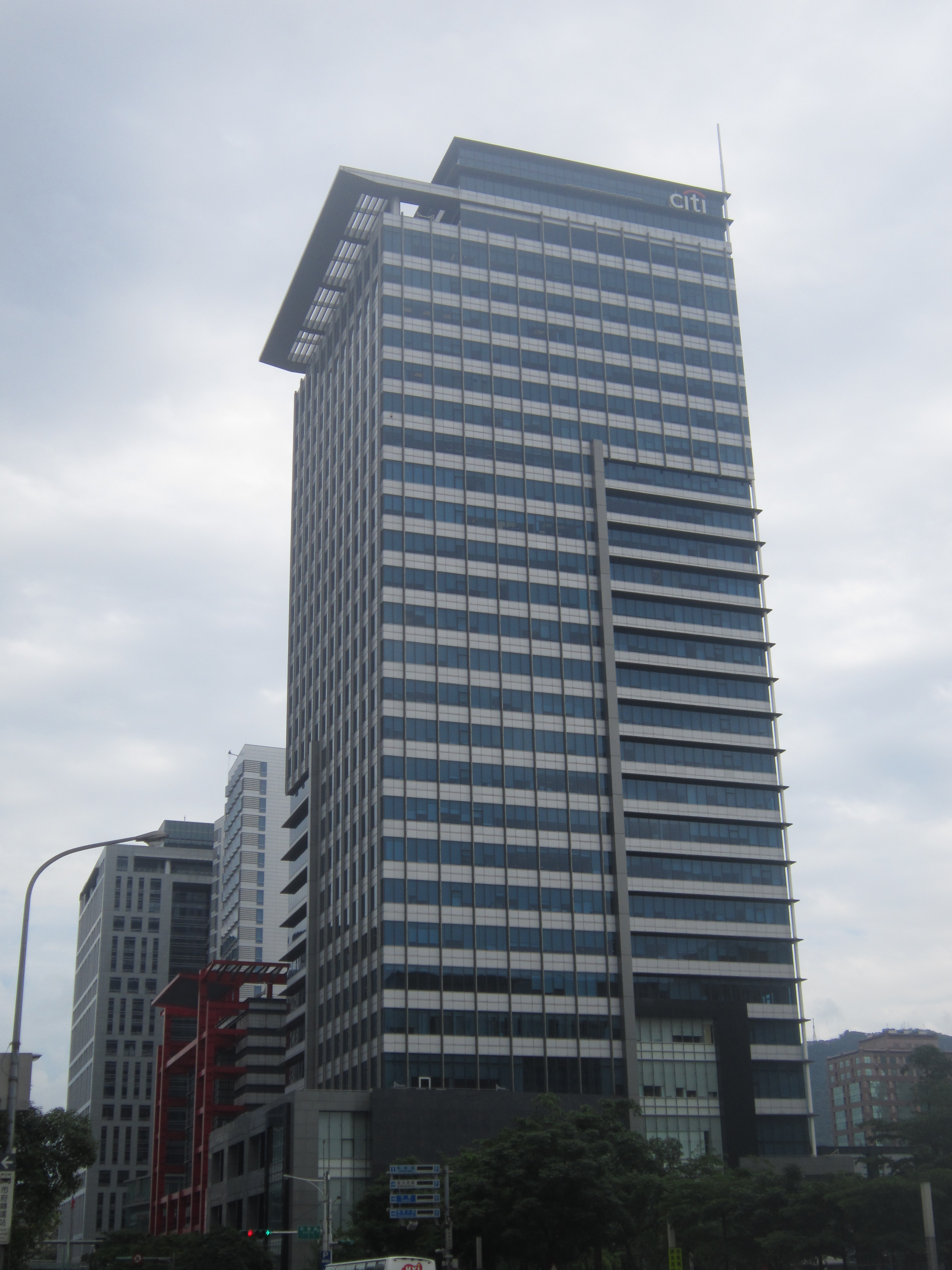 華新麗華大樓，位於臺北市信義區松智路1號，為華新麗華總部與花旗（台灣）商業銀行總部所在地。